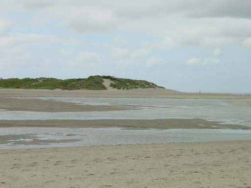 eigenwerk vrij voor gebruik bij vermelding maker ( Joep Zander) en bron (Wikipedia)